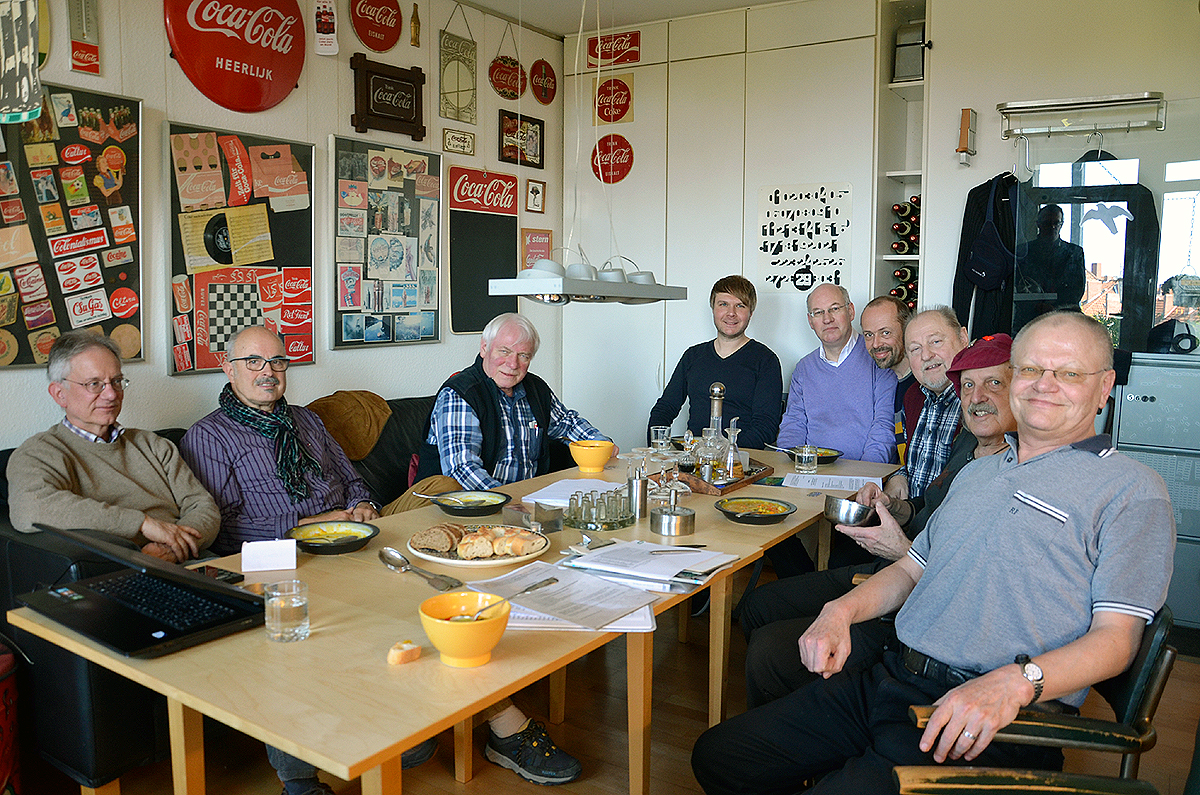 Ein Teil der Mitglieder während der Mitgliederversammlung für das Jahr 2013 des Vereins zur Erforschung der Geschichte der Homosexuellen in Niedersachsen e.V. (VEHN) bei Rainer Hoffschildt (ganz rechts im Bild) ...